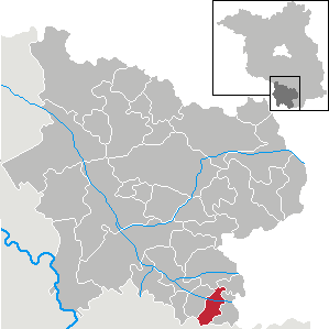 Hirschfeld in Brandenburg (Country) - District Elbe-Elster